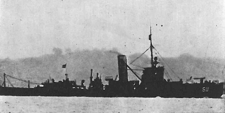 Niemiecki trałowiec M-109 "Sundevall" typu Minensuchboot 1916 (ex "Johann Wittenborg").